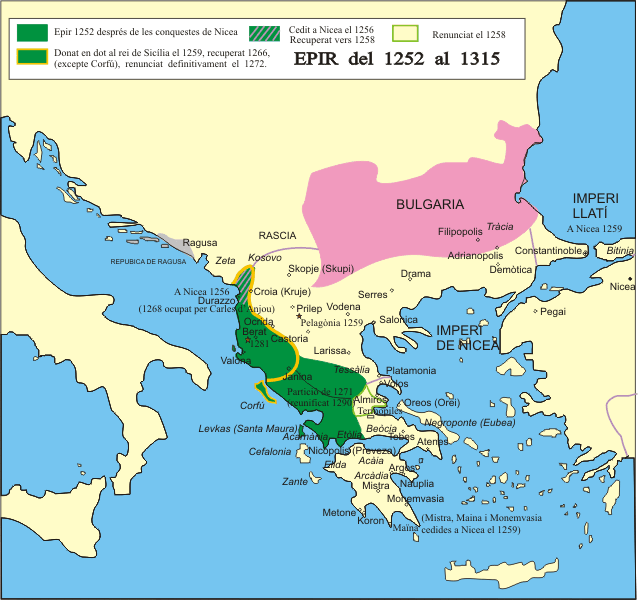 El despotado de Epiro del 1252 al 1315. Mapa del despotat d'Epir del 1252 al 1315, imatge propia